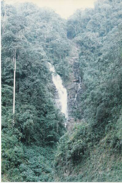 Fotografía personal, Albeiro Rodas, del municipio de Amalfi, para el artículo pertinente. Donación a la wikipedia.